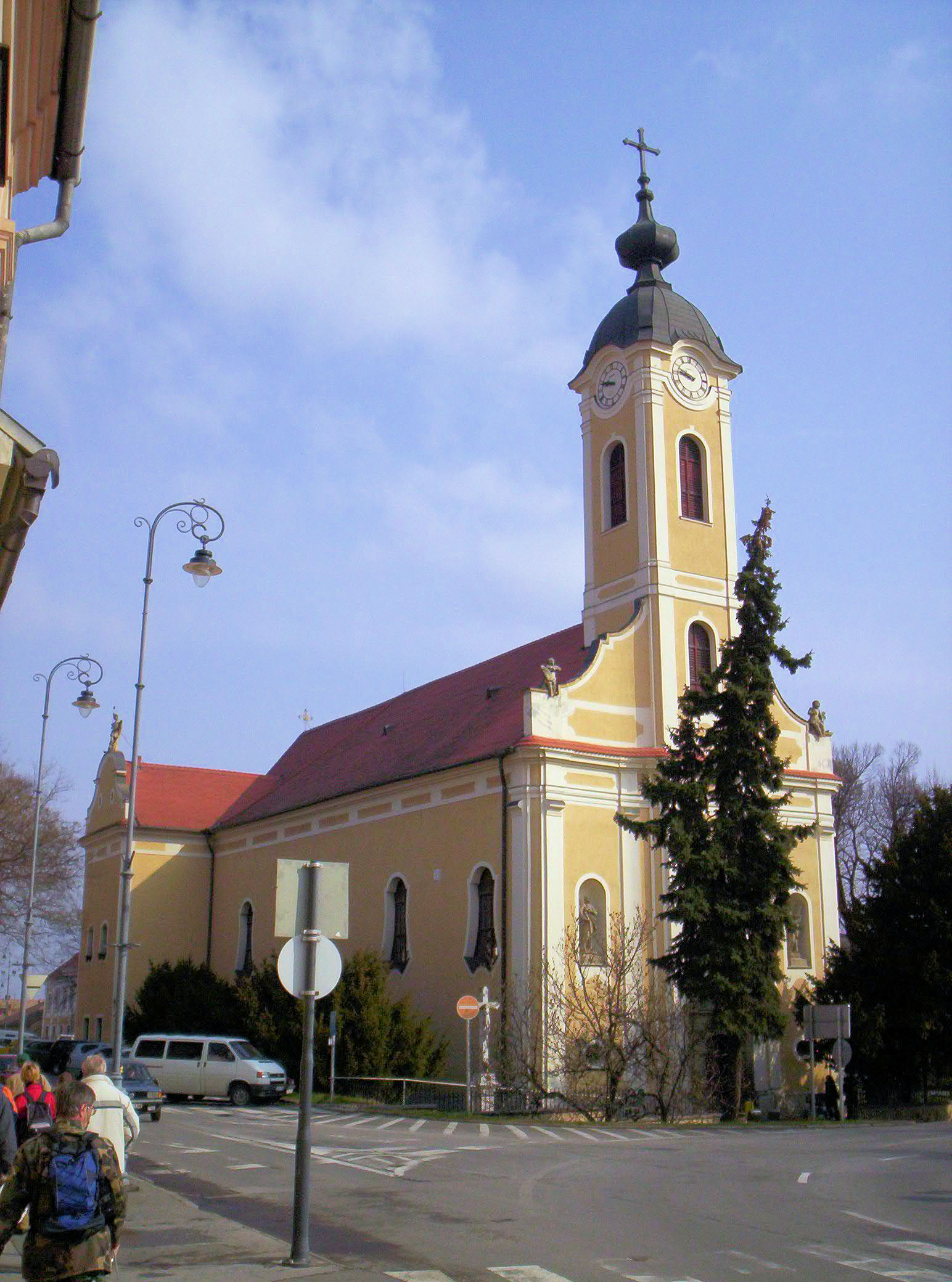 A római katolikus (Szeplőtlen Fogantatás) templom Bonyhádon. Épült 1782-ben – photo taken by uploader User:Csanády in 2007.